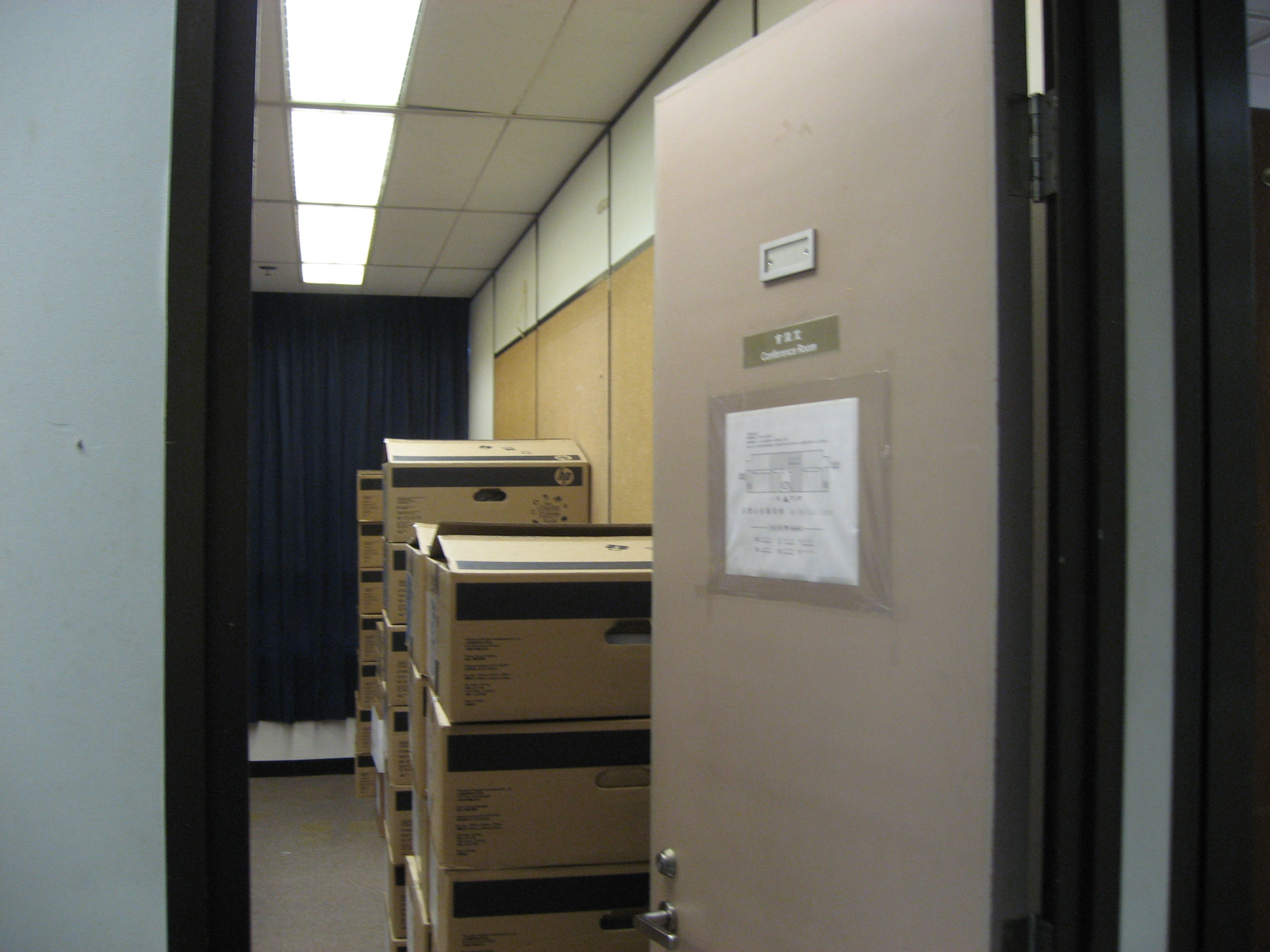 荃灣公共圖書館7樓會議室